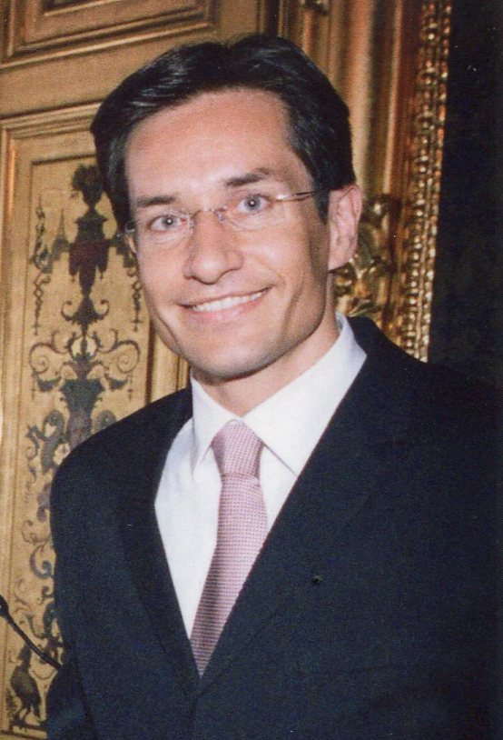 Der ehemalige österreichische Finanzminister Karl-Heinz Grasser